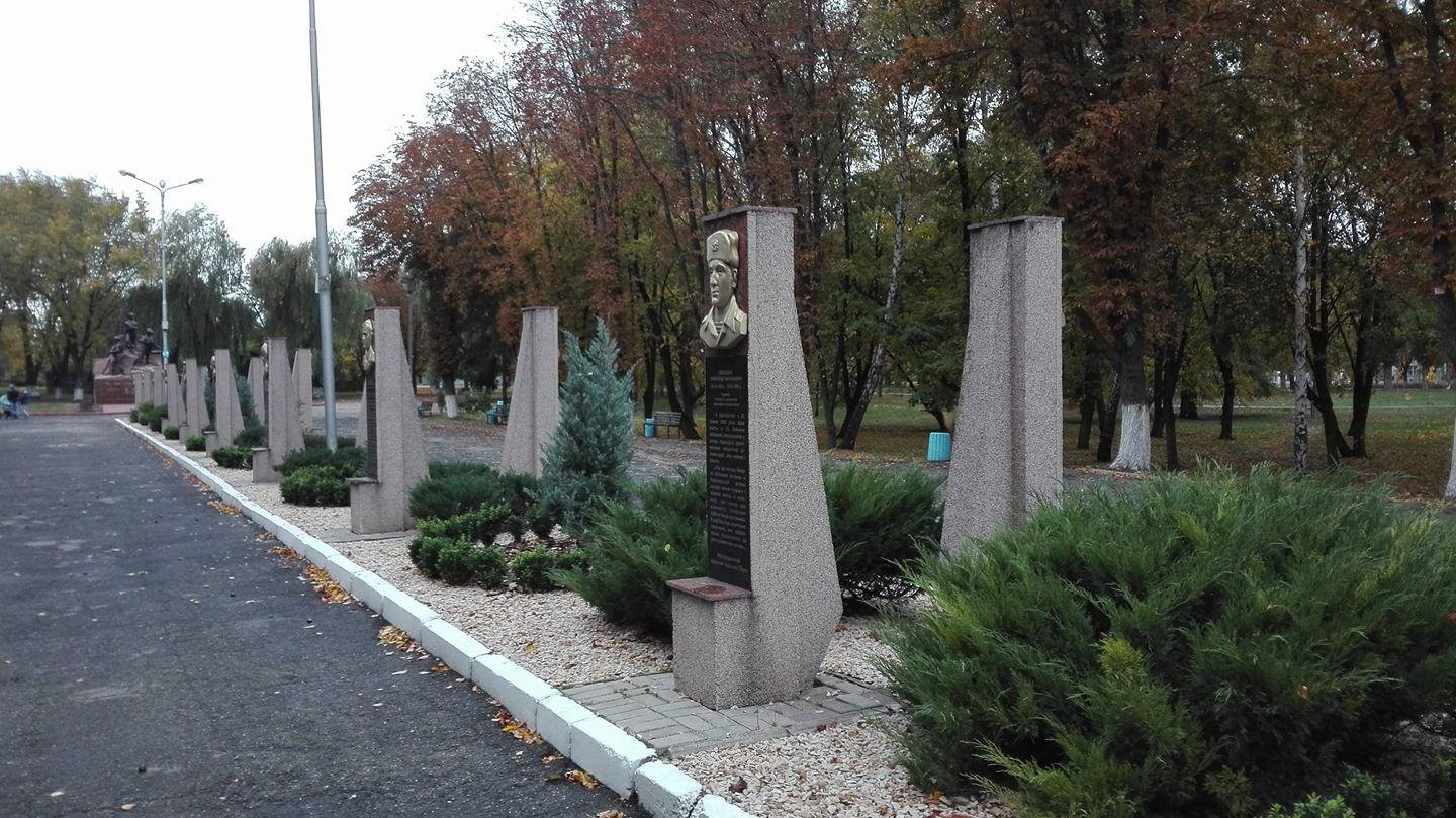 Аллея в парке Воинов-интернационалистов (город Кременчуг, Украина)